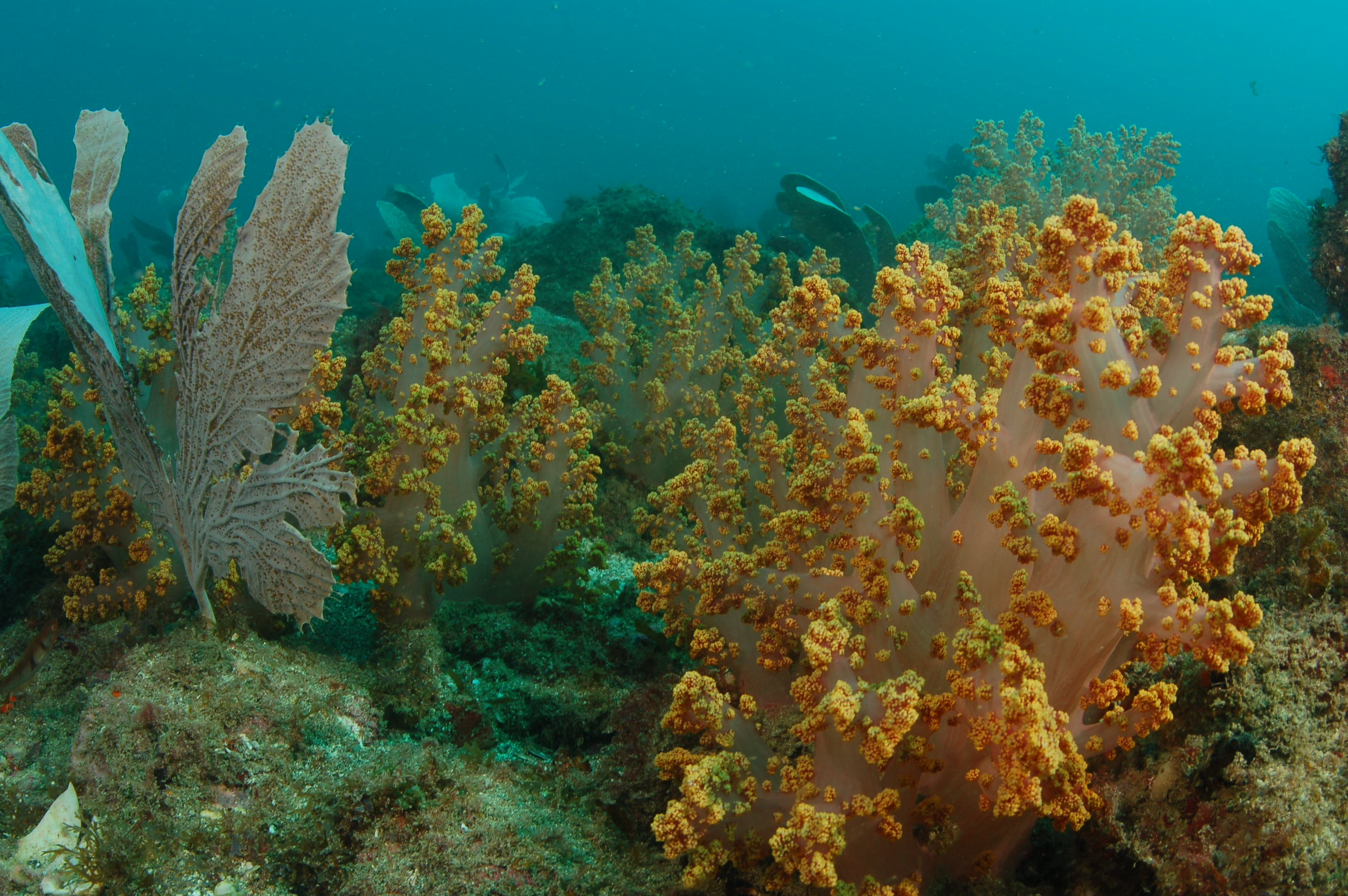 Peixes e Corais - Nilo - Recifes de Corais em Abrolhos